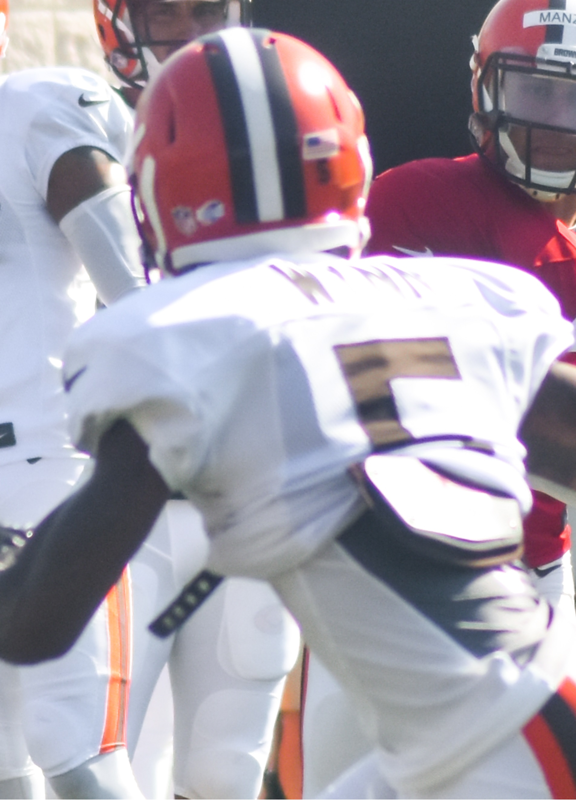 Wynn in 2015